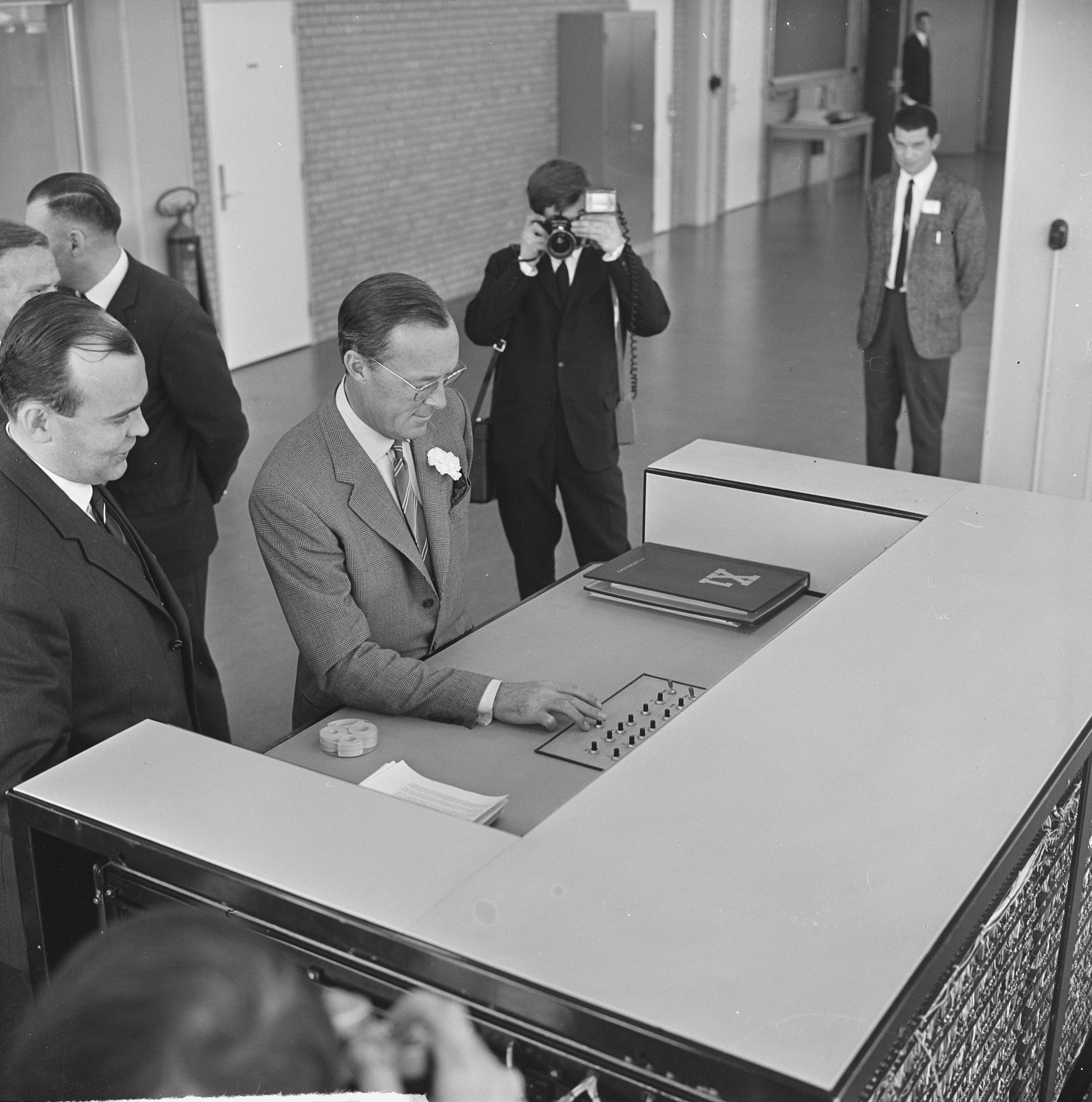 Collectie / Archief : Fotocollectie Anefo Reportage / Serie : [ onbekend ] Beschrijving : Prins Bernhard opende computerfabriek N.V. Electrologica te Rijswijk, de Prins tijdens rondgang Datum : 28 november 1964 Locatie : Rijswijk, Zuid-Holland Trefwoorden : computers, fabrieken, prinsen Persoonsnaam : Bernhard (prins Nederland) Fotograaf : Koch, Eric / Anefo Auteursrechthebbende : Nationaal Archief Materiaalsoort : Negatief (zwart/wit) Nummer archiefinventaris : bekijk toegang 2.24.01.03 Bestanddeelnummer : 917-1784